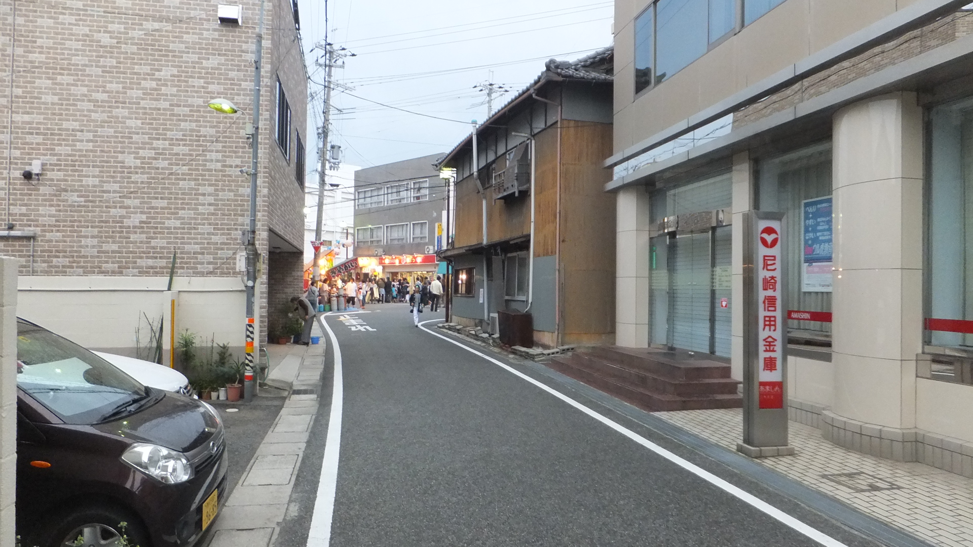 兵庫県三木市本町3丁目